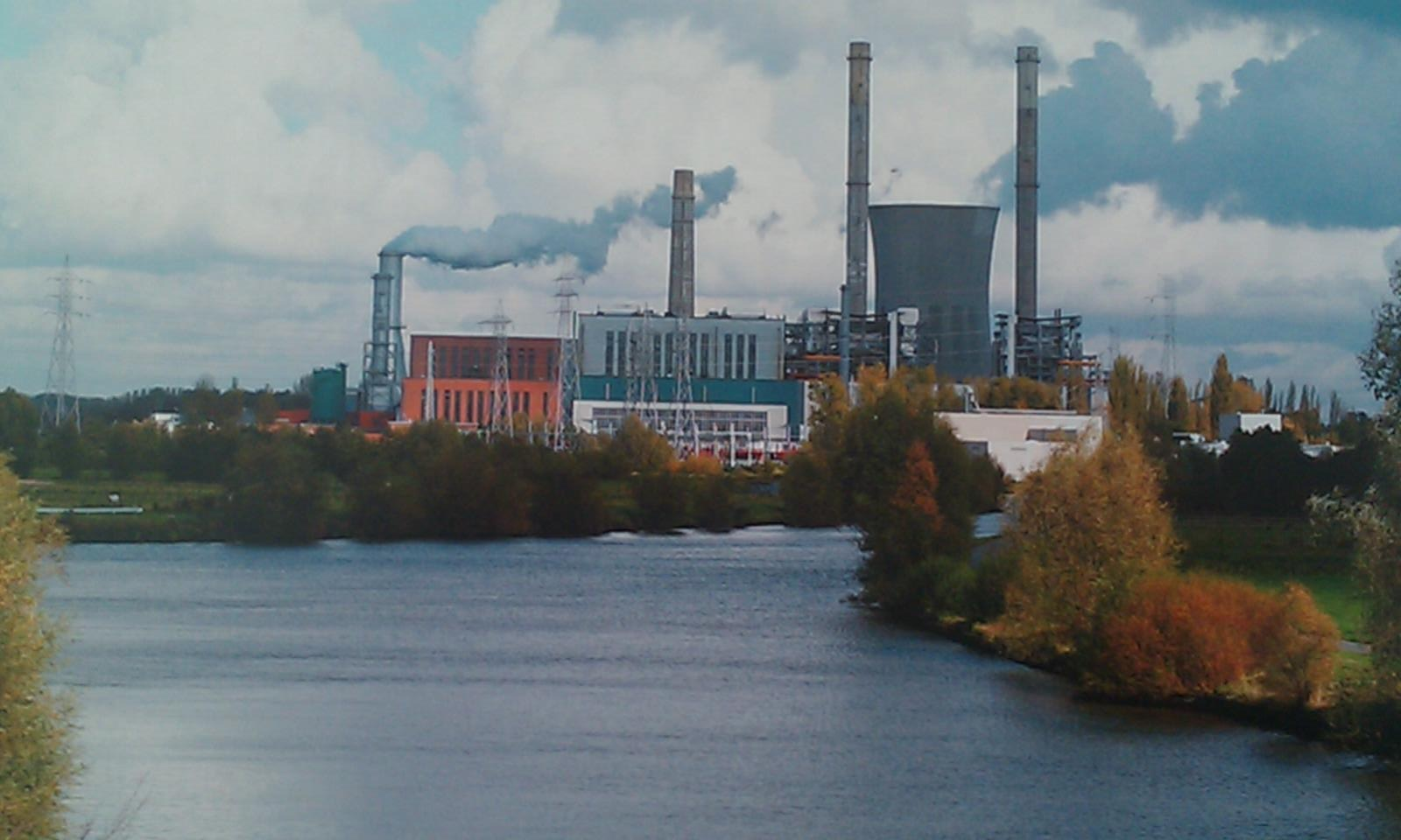 Elektriciteitscentrale van Ruien - (Centrale électrique de Ruien sur l'Escaut).